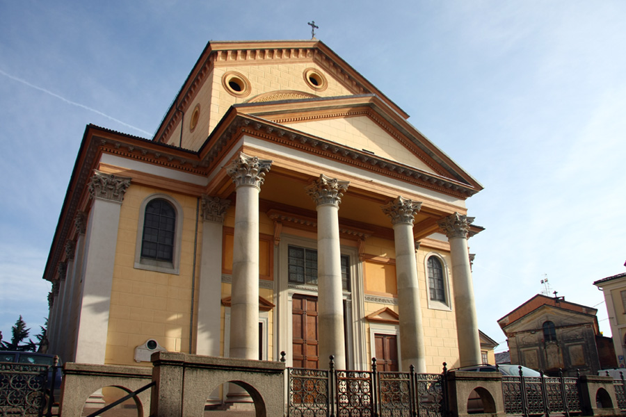 Chiesa parrocchiale dei SS. Pietro e Paolo Apostoli a Oleggio (NO)